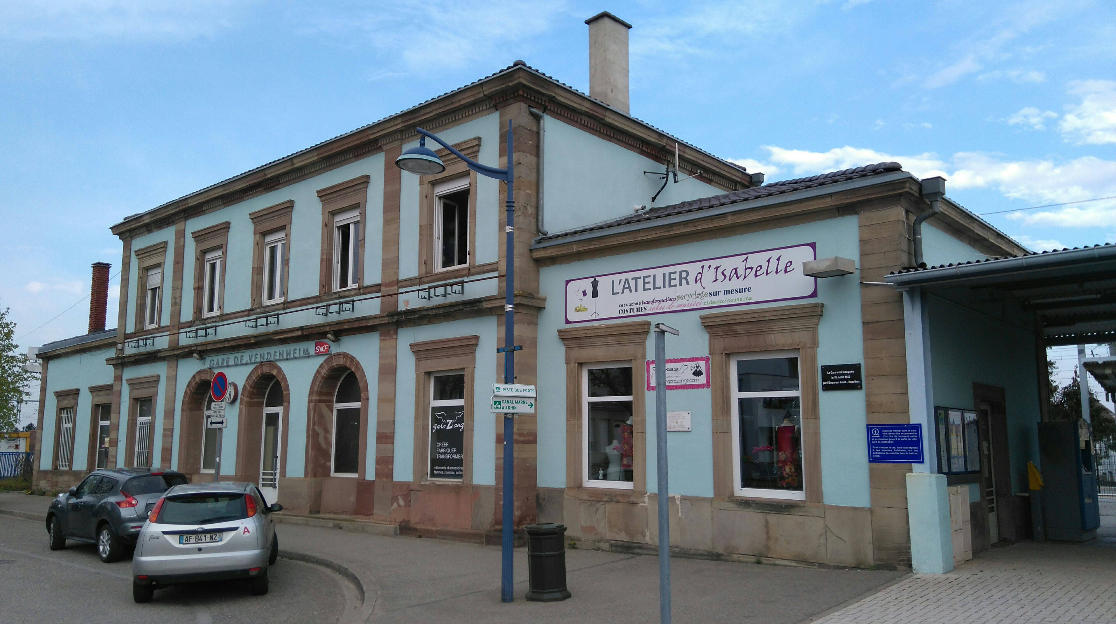 Gare de Vendenheim.